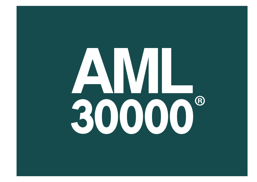 Marque de conformité au référentiel AML 30000